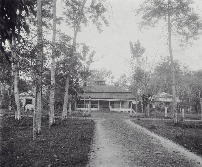 Foto. Een koloniale villa met bijgebouwen, Bikeroe onderafdeling Bonthain op Celebes